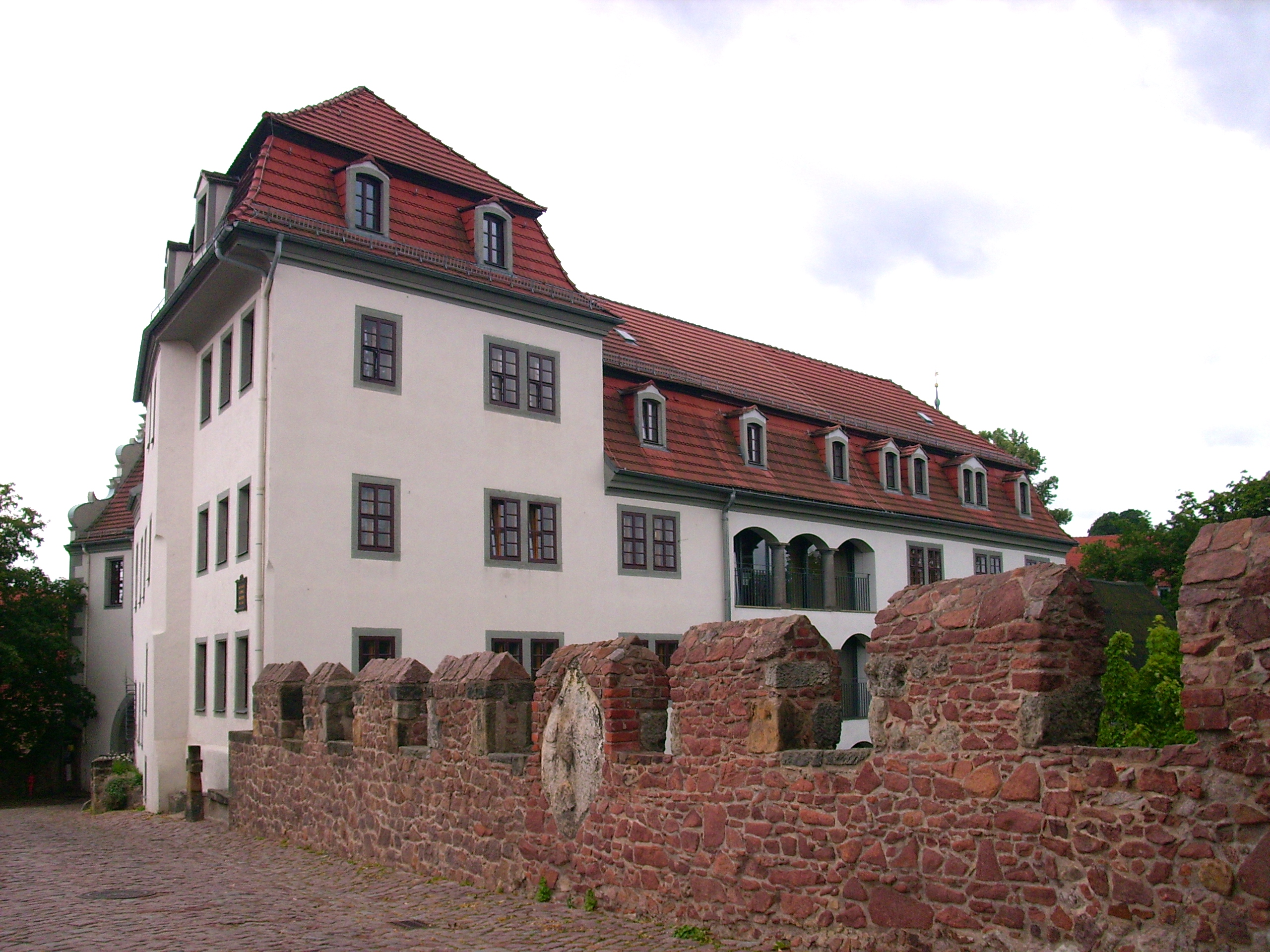 Wohnhaus, Freiheit 2 in Meißen